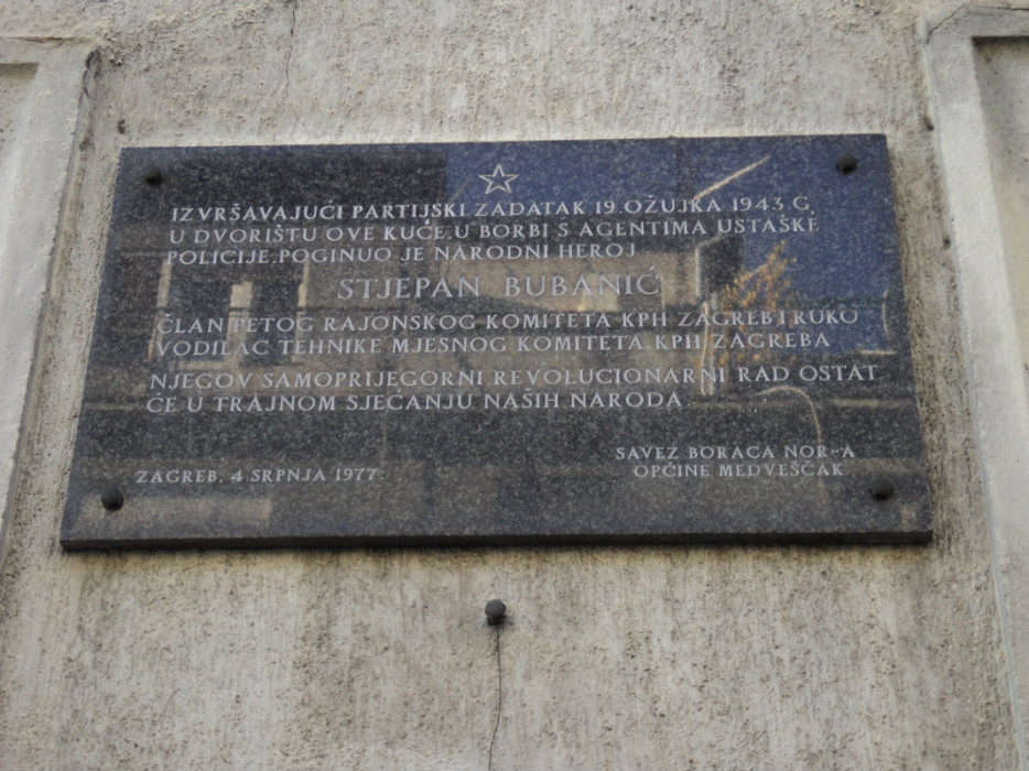 Spomen ploča na kući u čijem je dvorištu poginuo Stjepan Bubanić